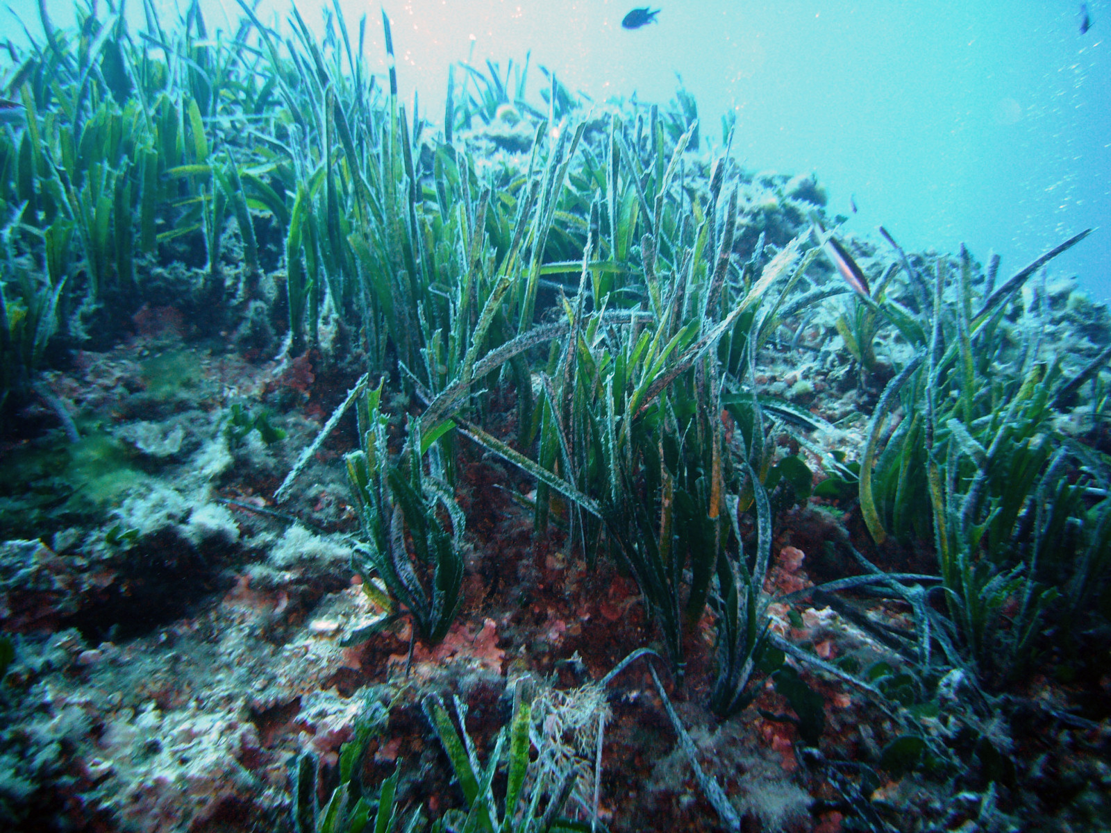 Posidonia oceanica, diving in Portofino, Italy